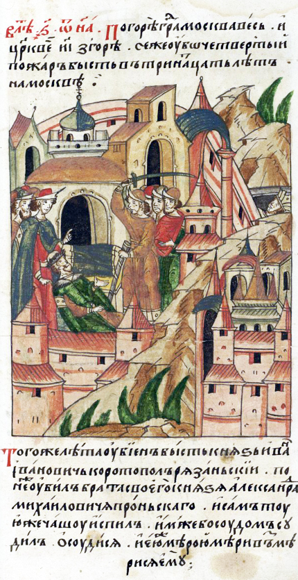 ЛИЦЕВОЙ ЛЕТОПИСНЫЙ СВОД В том году убиен был князь Иван Иванович Коротополый Рязанский. Так как он убил своего брата Александра Михайловича Пронского, то и сам сию чашу испил: таким же судом был судим, и такою же мерою было отмерено ему.